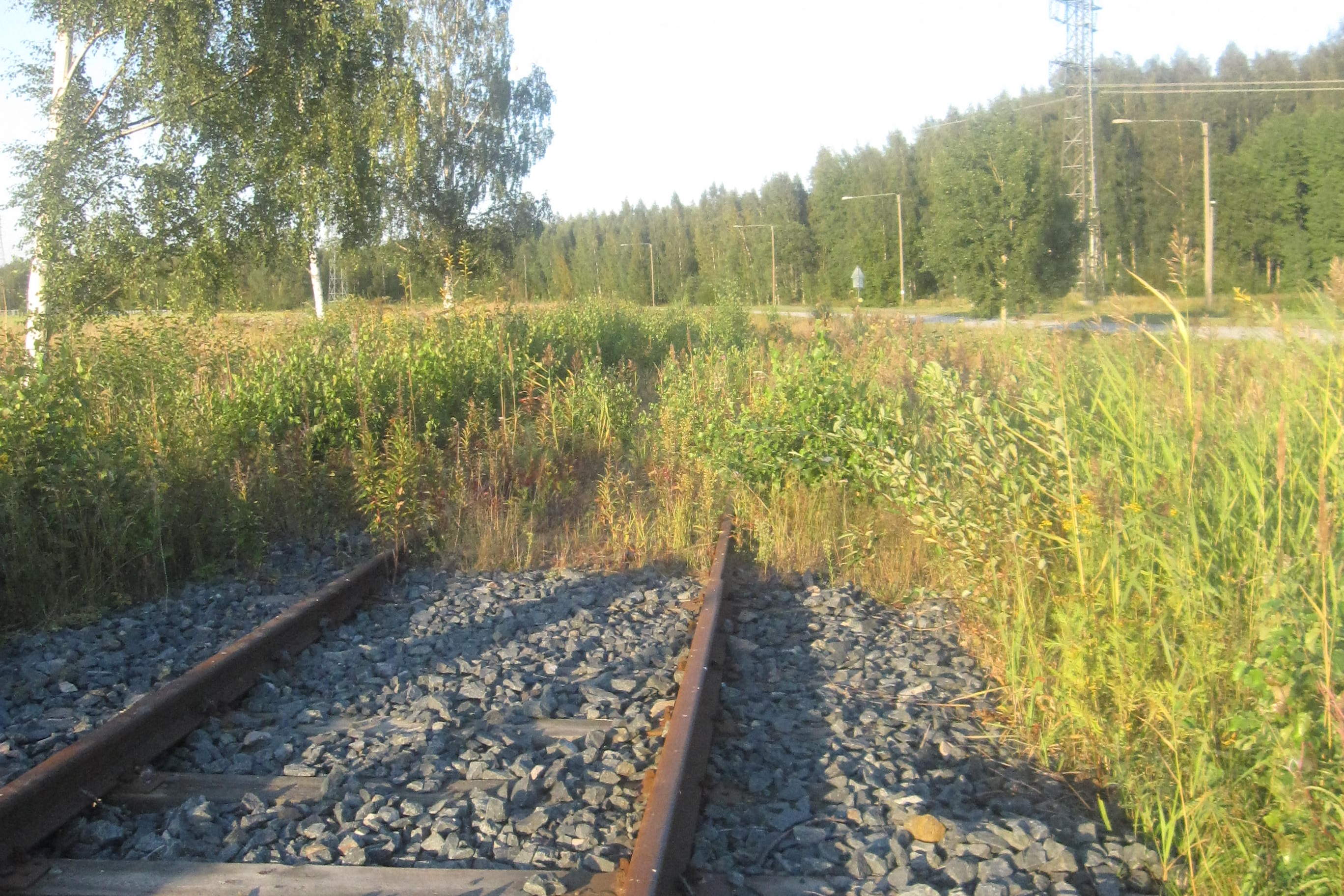 Tikkurila-Hakkila-radan pistoraide Tikkurilan maalitehtaalle pohjoiseen päin kuvattuna.